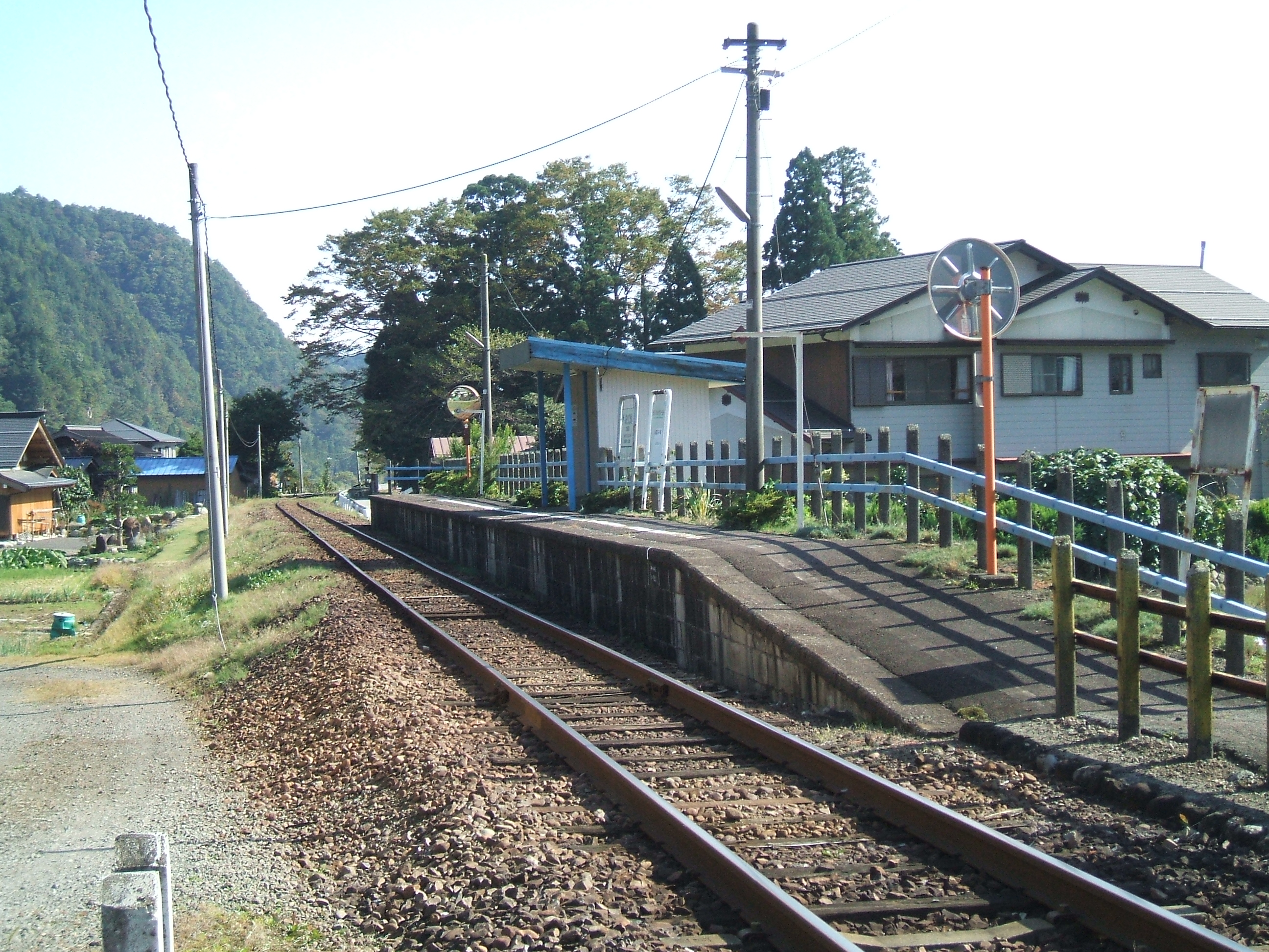 駅の様子